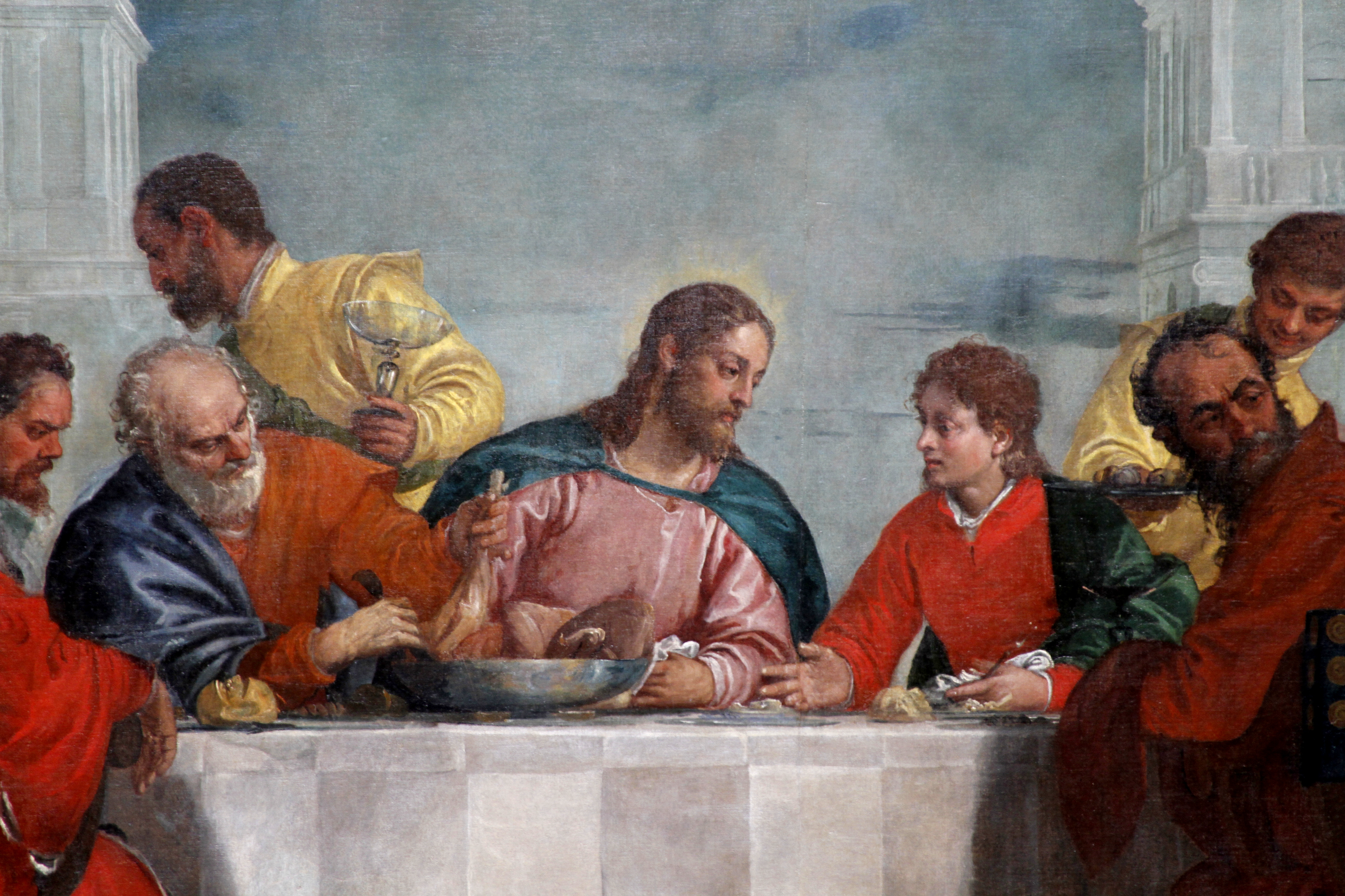 Banquet in the House of Levi by Paolo Veronese